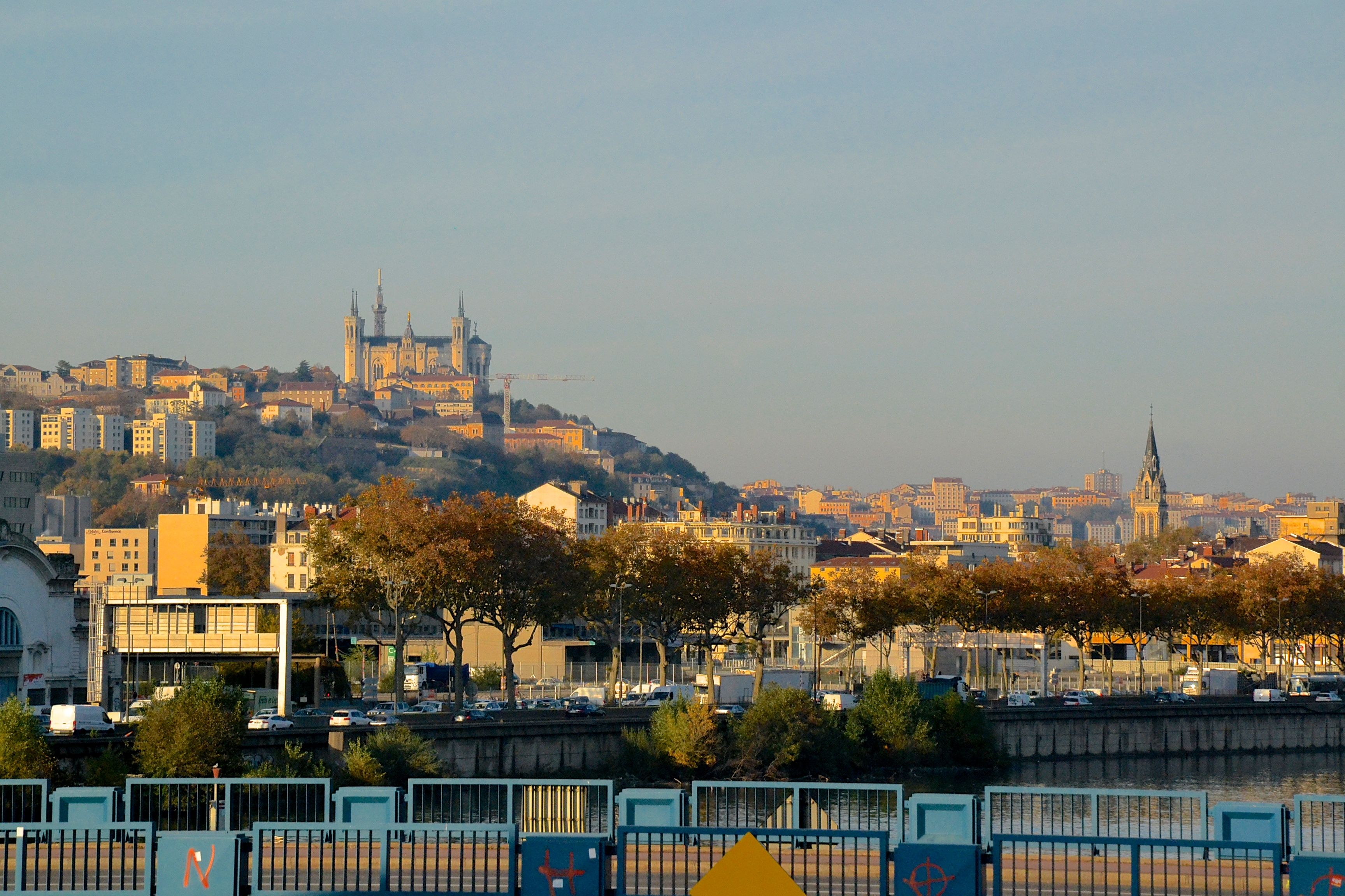 Vue de Lyon depuis le pont Raymond Barre (Rhône, France).